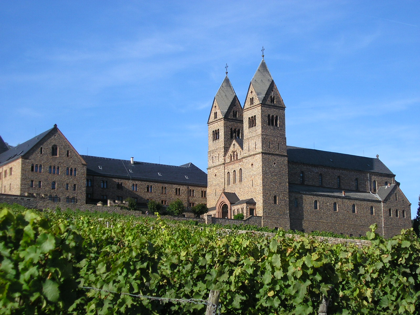 Benediktinerinnenkloster Eibingen